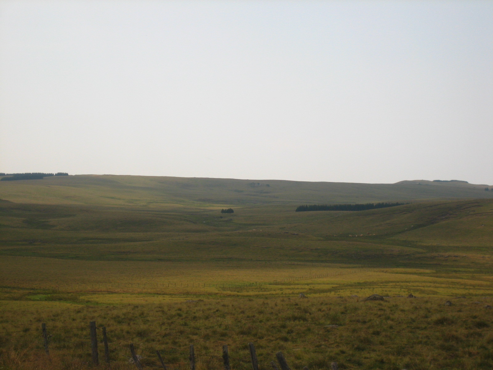 Aubrac près de Nasbinals.